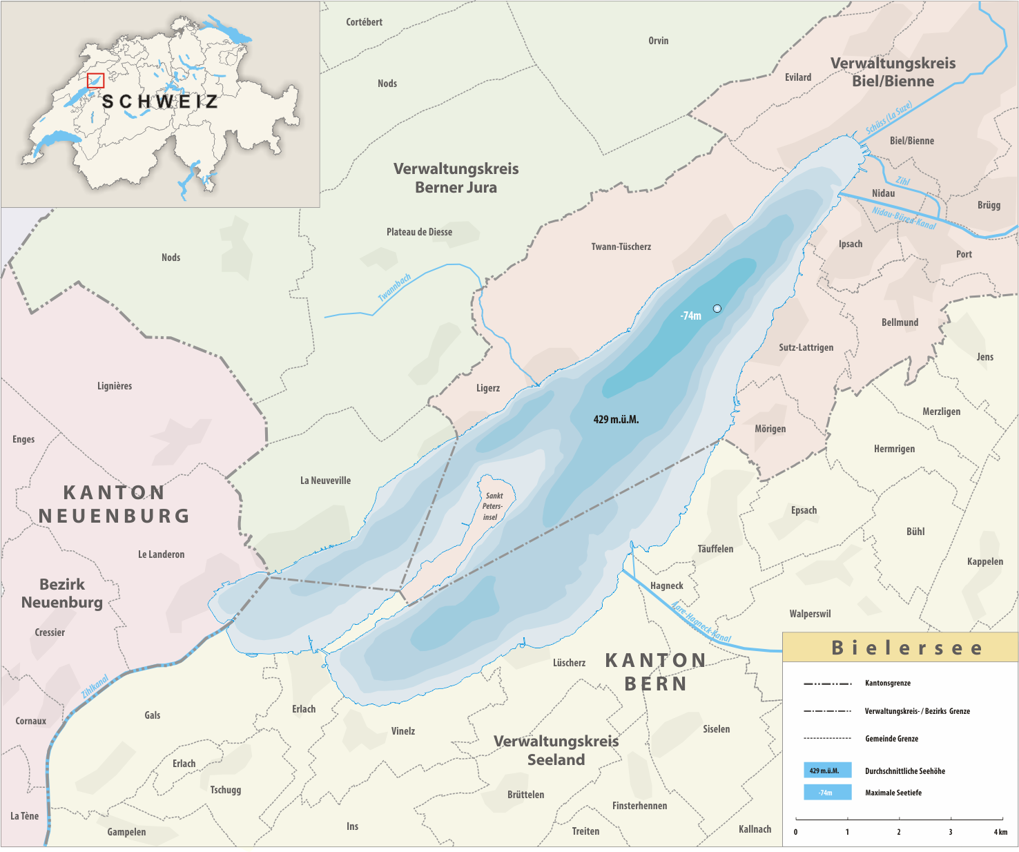 Bielersee